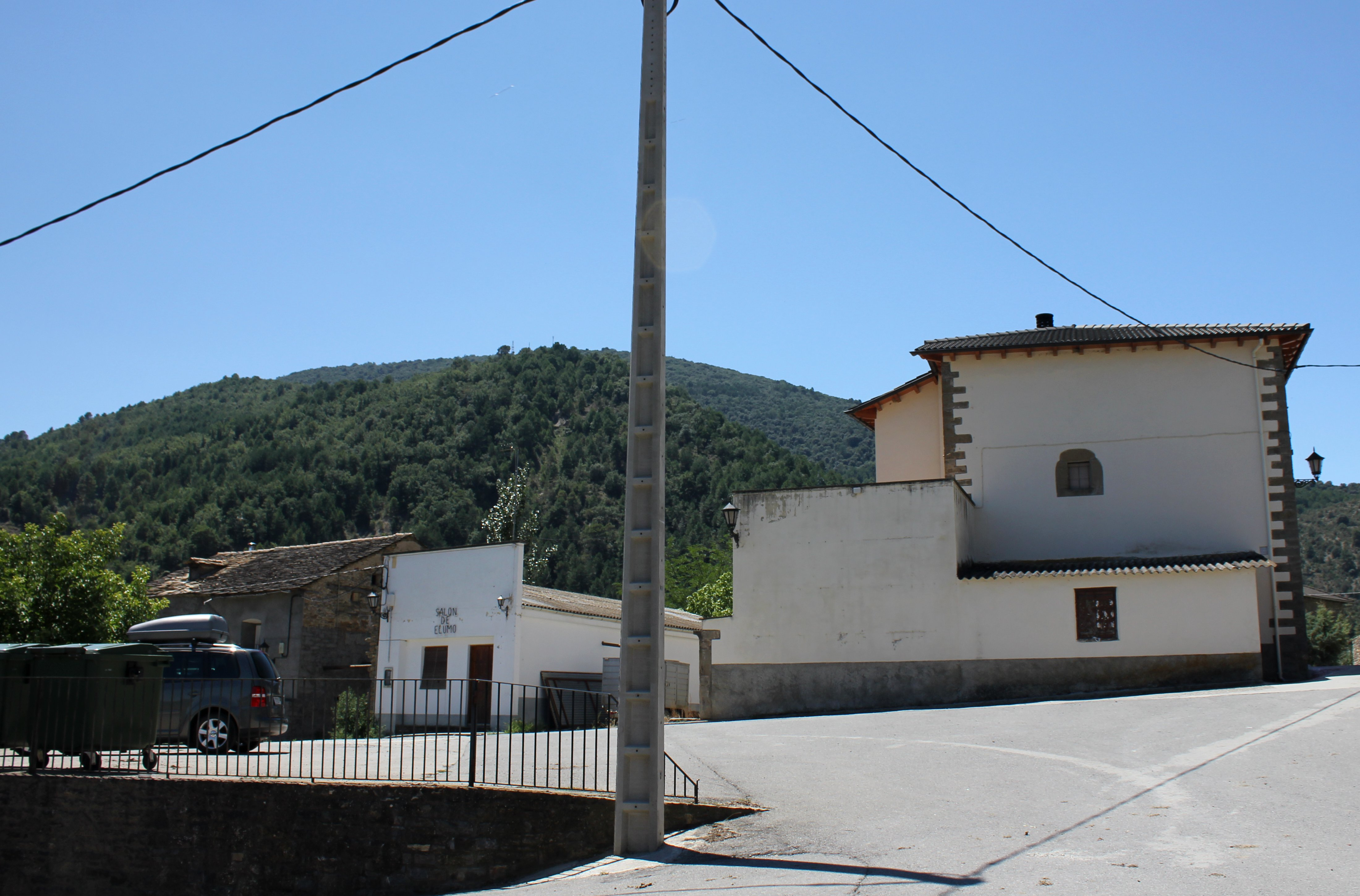 Aragonés: Plaza de O Lumo de Muro (A Fueva).